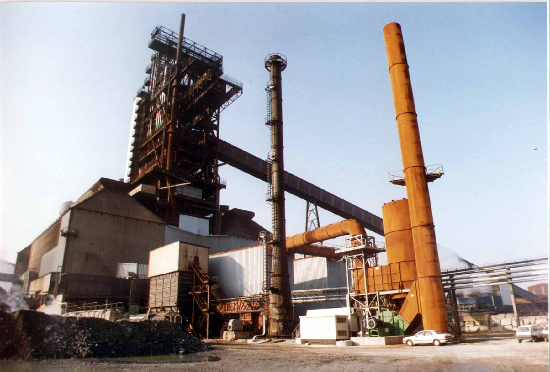 Double halle de bouletage (en blanc) avec au premier plan le système de lavage des gaz. En arrière-plan, le haut fourneau n°2 de Fos-sur-mer.